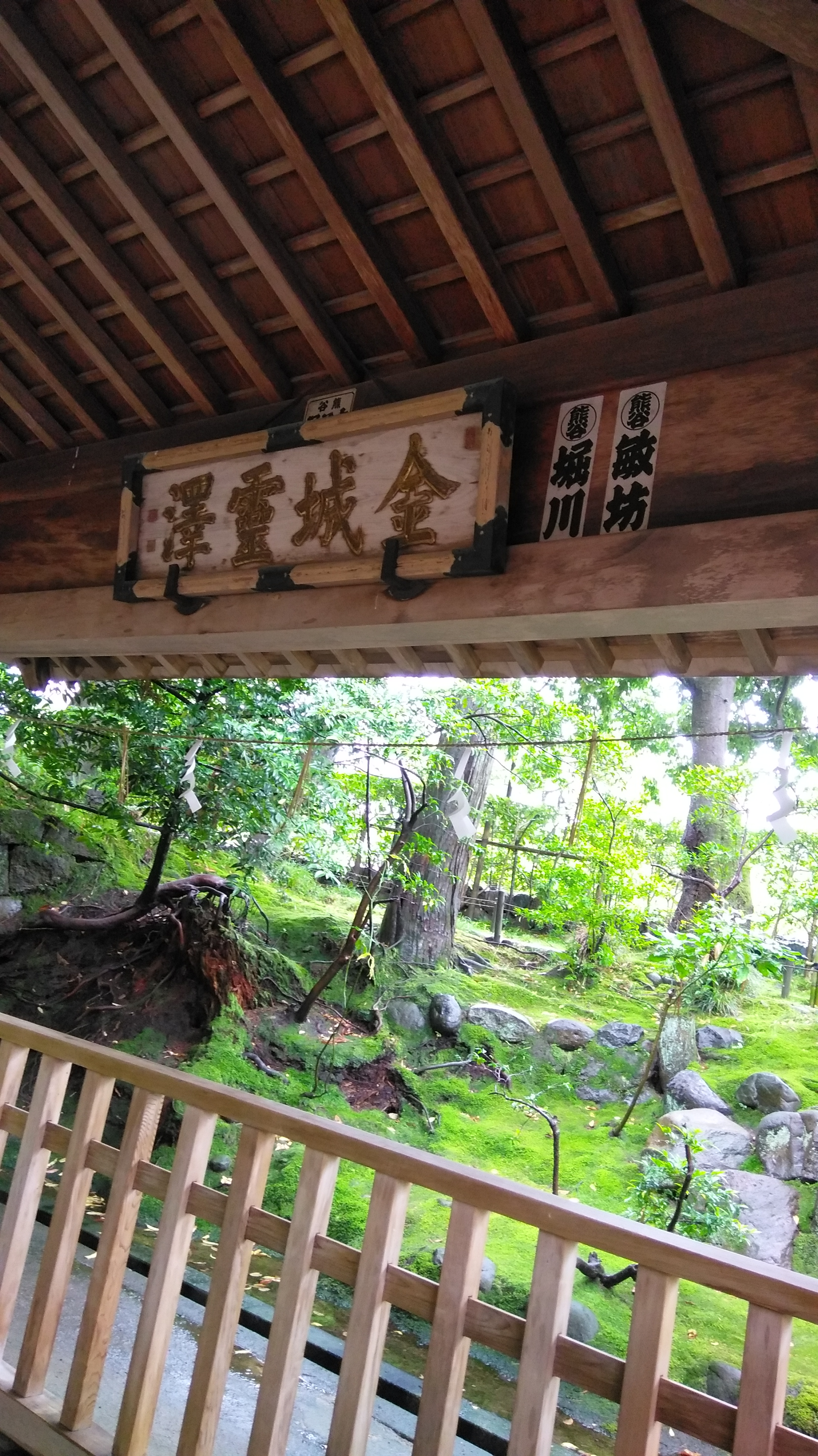 金沢市の兼六園の近くにある泉